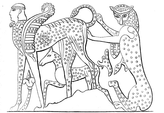 Dessin de fresques Tombe Campana